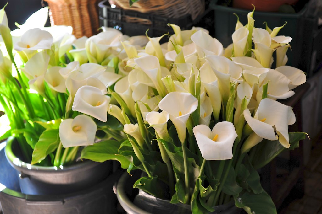 Île de Madère, Funchal